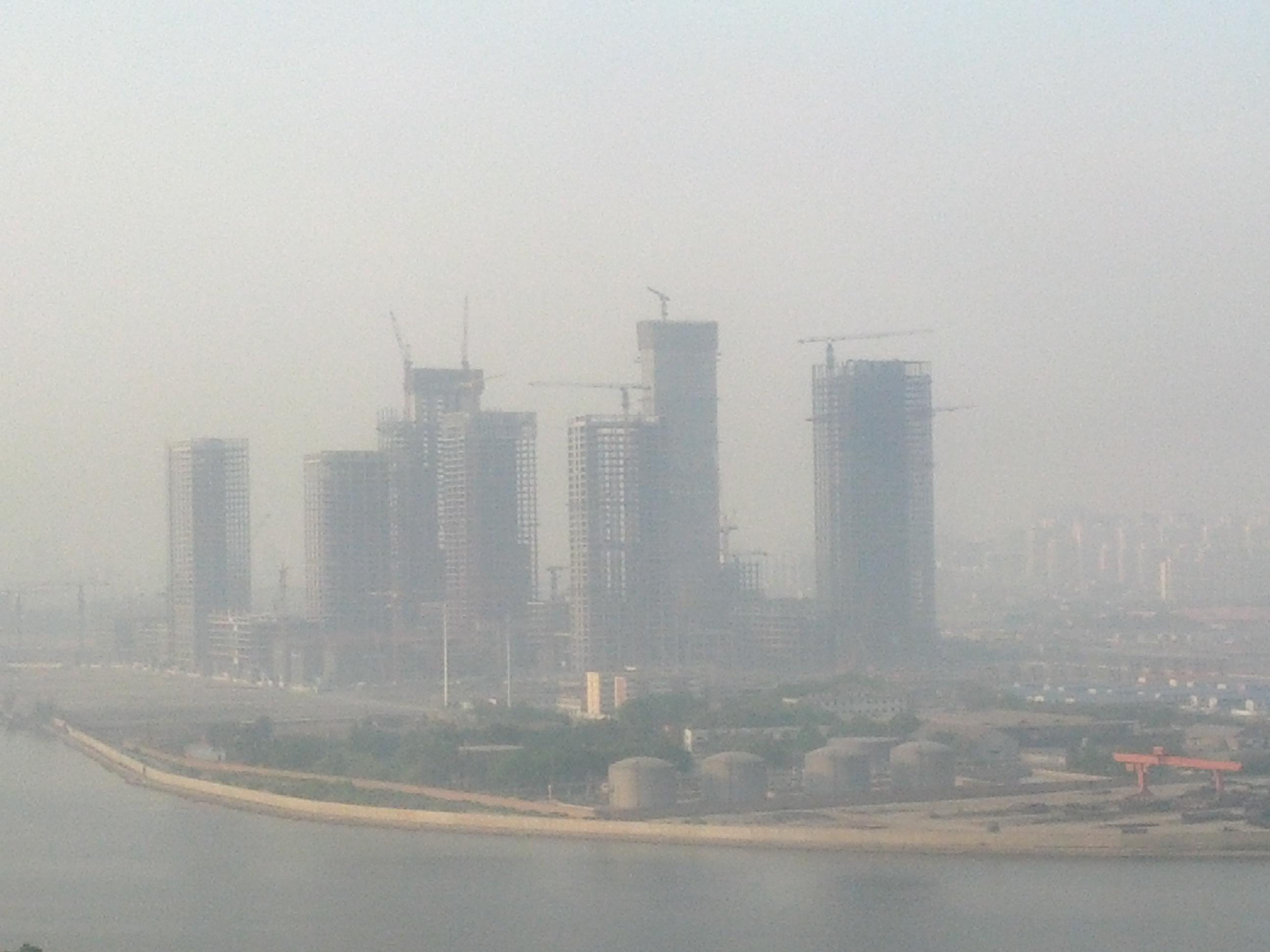 鸟瞰正在建设中的于家堡金融区